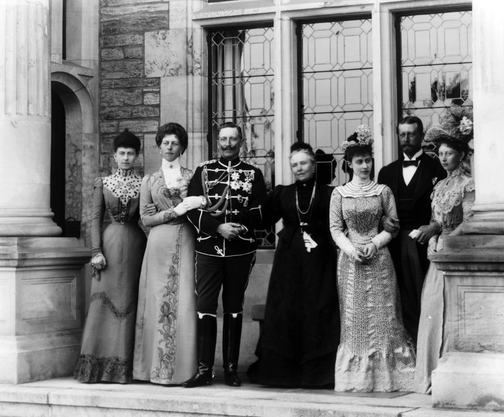 Vitória do Reino Unido,os Imperatriz-viúva da Alemanha e seus filhos (a partir da esquerda), em 1900: Princesa Sofia, Princesa Vitória, Kaiser Guilherme II, a Imperatriz-viúva, Princesa Carlota, Príncipe Henrique e Princesa Margarida.